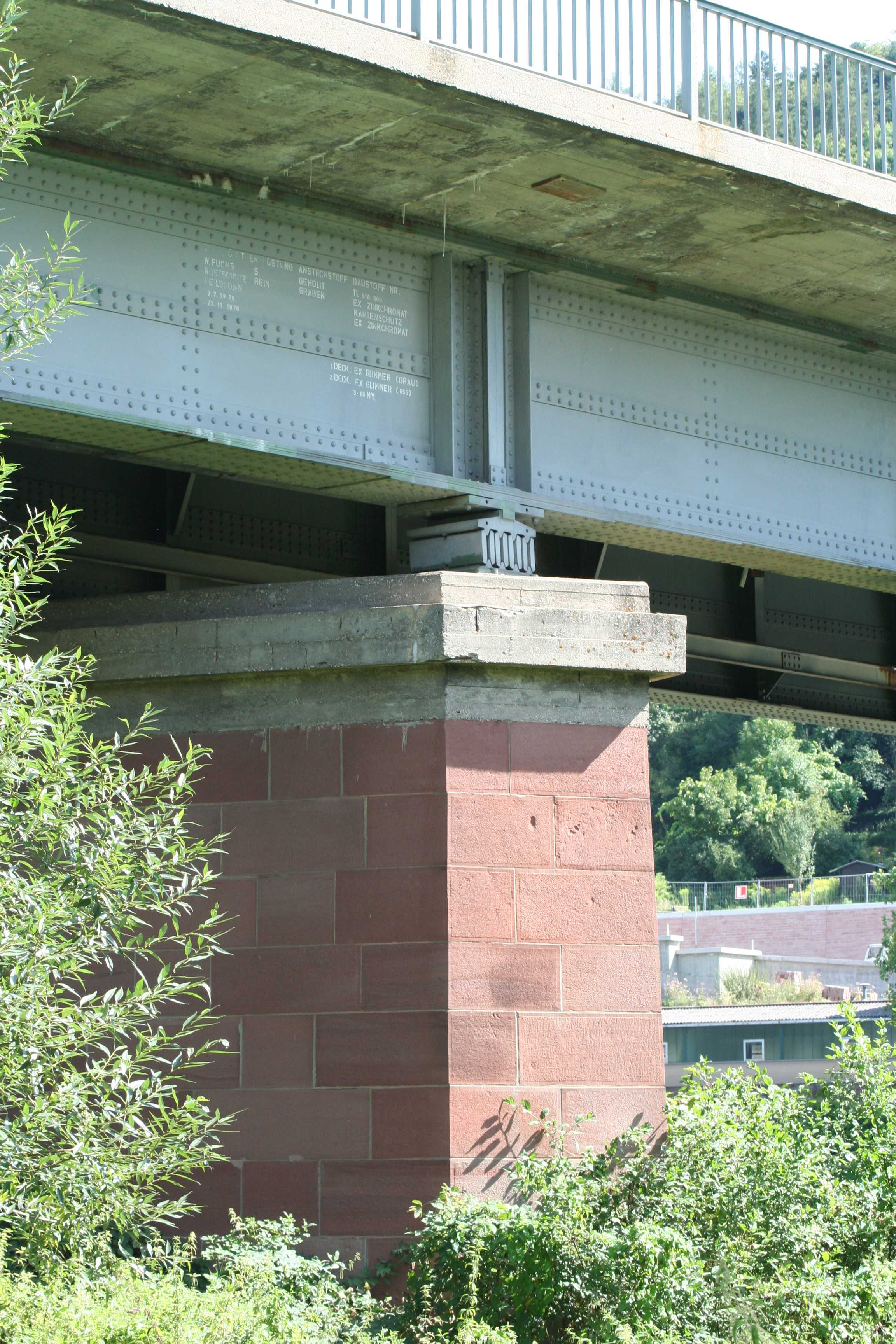 Mainbrücke Wertheim-Kreuzwertheim, Unterfranken